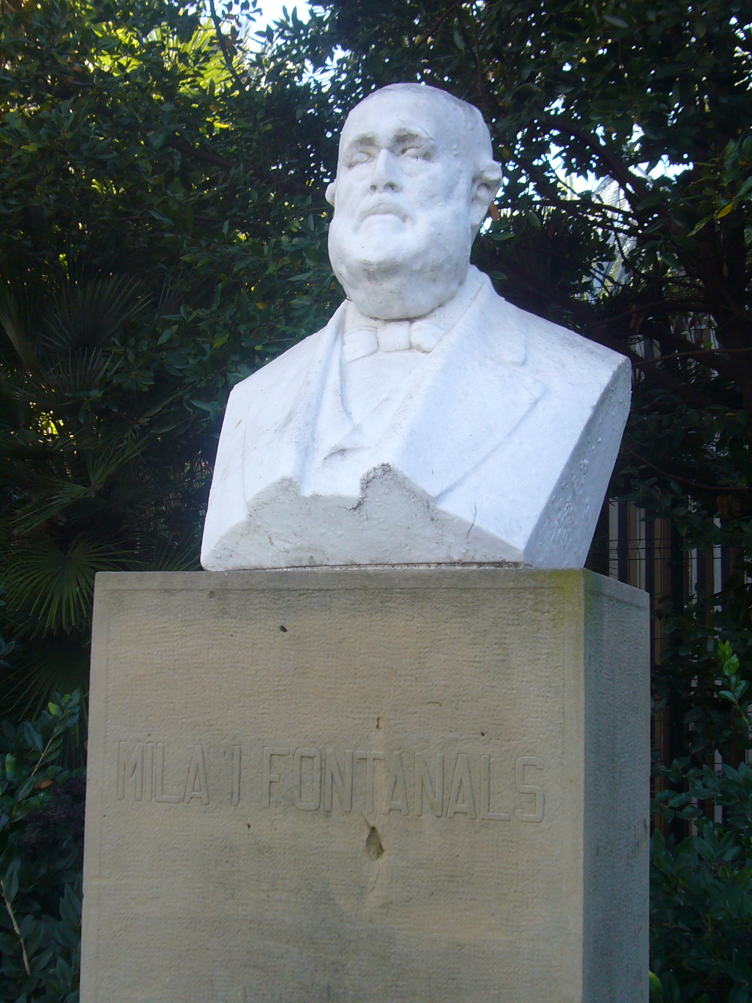 Milà i Fontanals - Bust al Parc de la Ciutadella